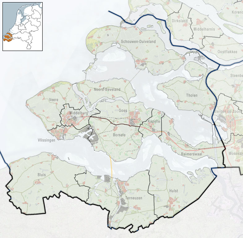 Referentiekaart van Provincie Zeeland, met indeling van gemeenten (2010) en impressie van het landschap. Door Jan-Willem van Aalst, samengesteld uit publiek beschikbare geo-data: Referentie-ondergrond (kustlijn, steden, wegen) gerasterd uit de OpenStreet Map OSM. ( Inhoud is beschikbaar onder de Creative Commons Attribution-ShareAlike 3.0 license. Referentie-ondergrond op water bewerkt vanuit Gebruik is vrij met bronvermelding NLR en ESA. Vectorgrenzen van gemeenten en regio's vrij ter beschikking gesteld met dank aan cartografen van brandweerregio's Hollands-Midden en IJsselland; gerasterd in Photoshop. Hoogte-aanduidingen (reliëf) gerasterd uit de AHN Viewer ( gebruik is vrij met bronvermelding (c) AHN, Overige kenmerken op de kaart: eigen tekenwerk van Jan-Willem van Aalst, op basis van gerasterde gemeentegrenzen.